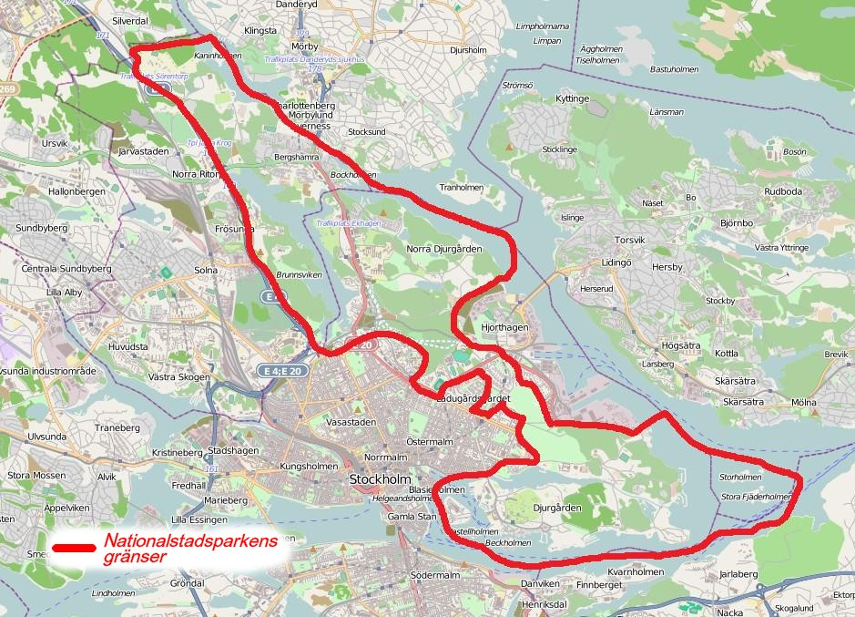 Karta över Nationalstadsparken Solna/Stockholm, källa: This map may be incomplete, and may contain errors. Don't rely solely on it for navigation.